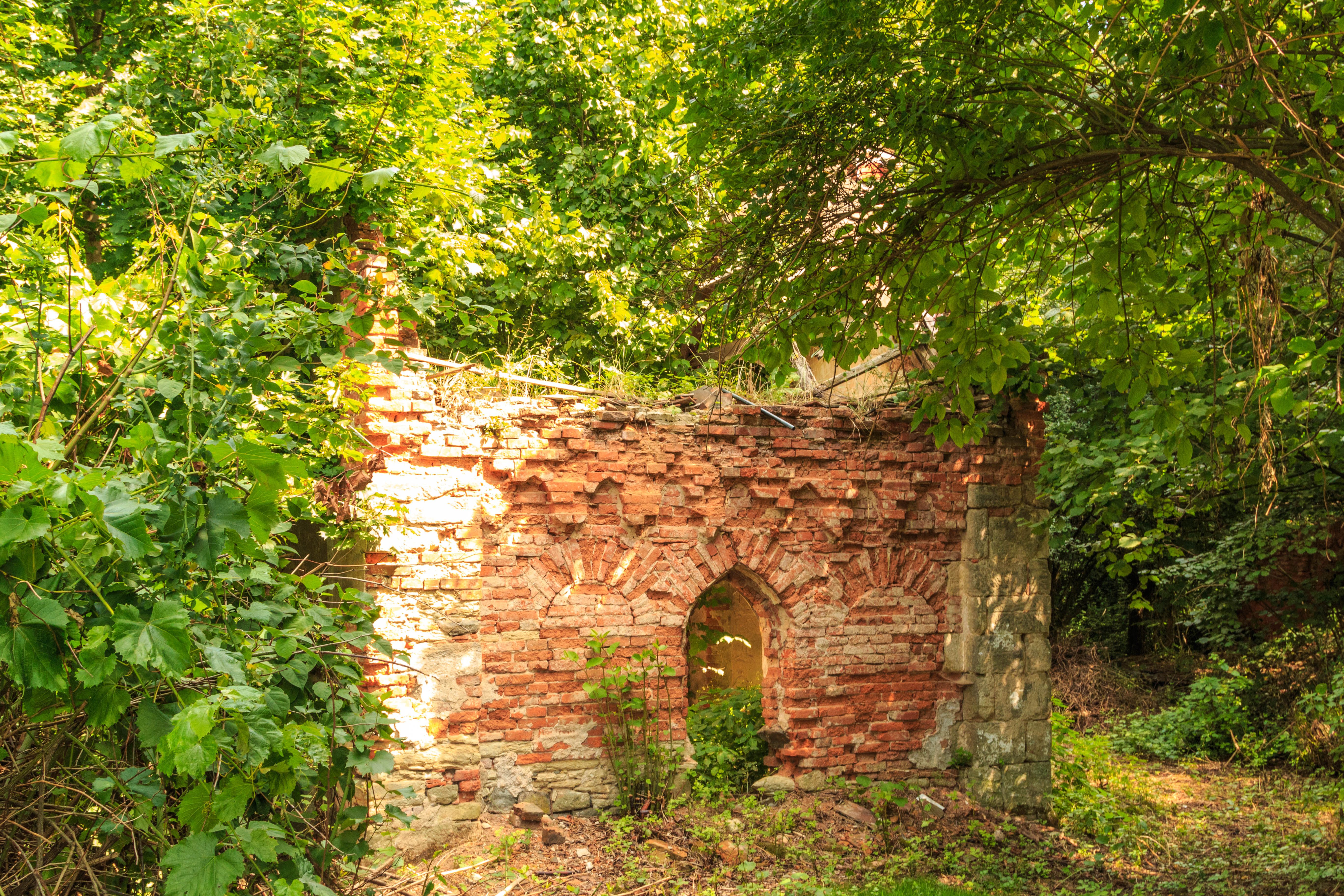 Ruina kaple Nejsvětější Trojice v Pardubicích